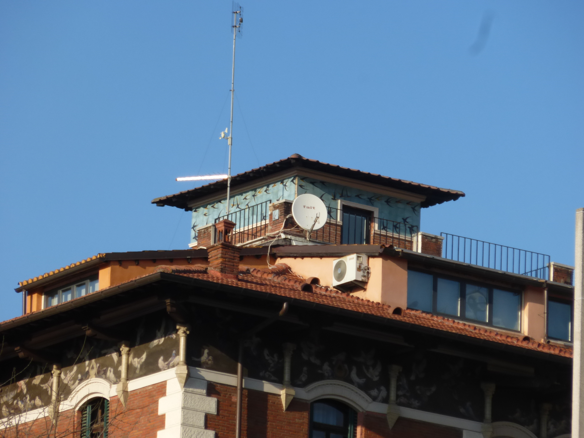 Roma, via Alessandro Farnese, villino Vitali (Arturo Pazzi, 1905)